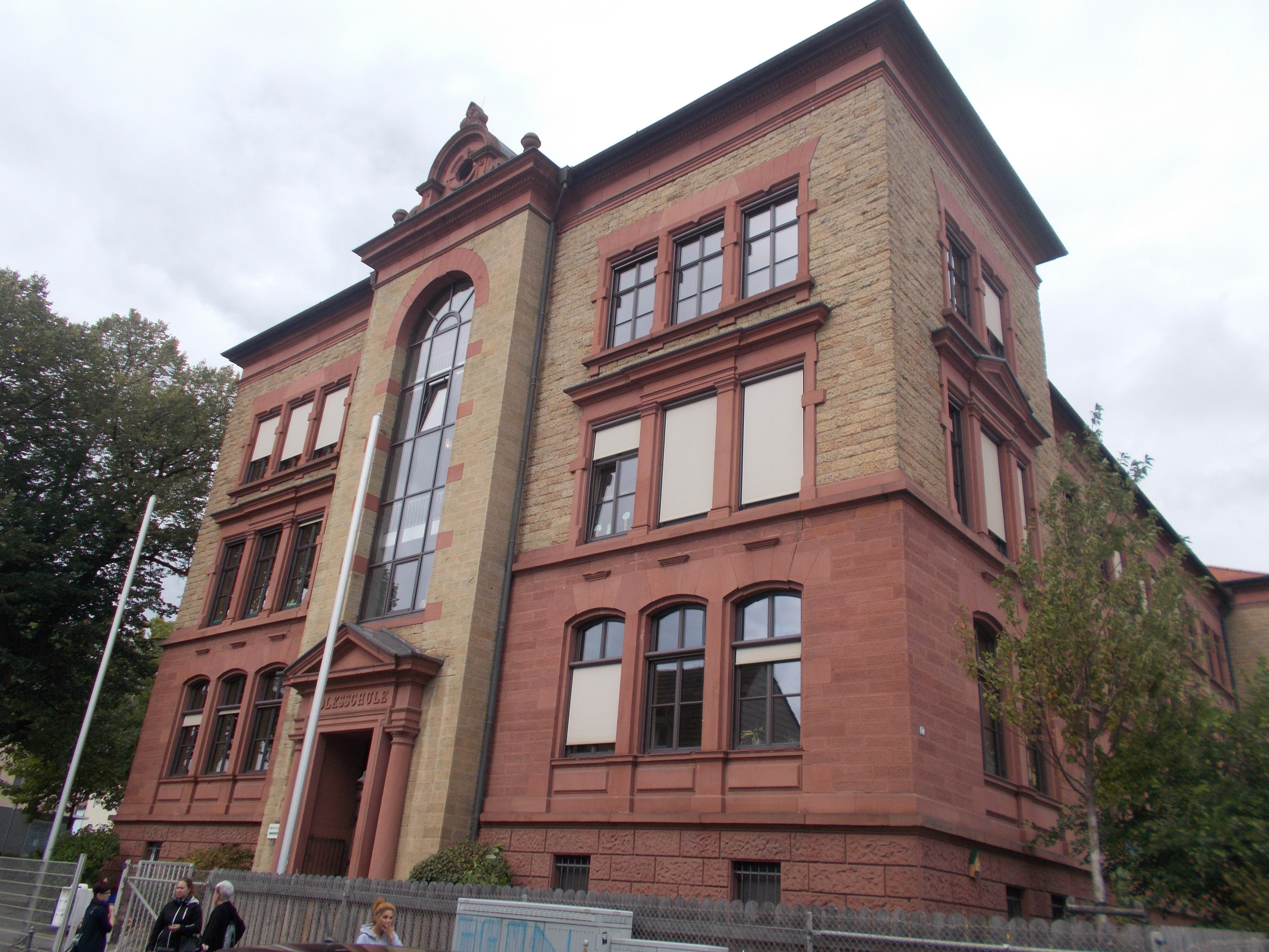 imposanter dreigeschossiger Sandsteinquaderbau mit Walmdach, klassizistische Motive, 1891–93, Architekt Ludwig Ritter von Stempel; mit Ausstattung